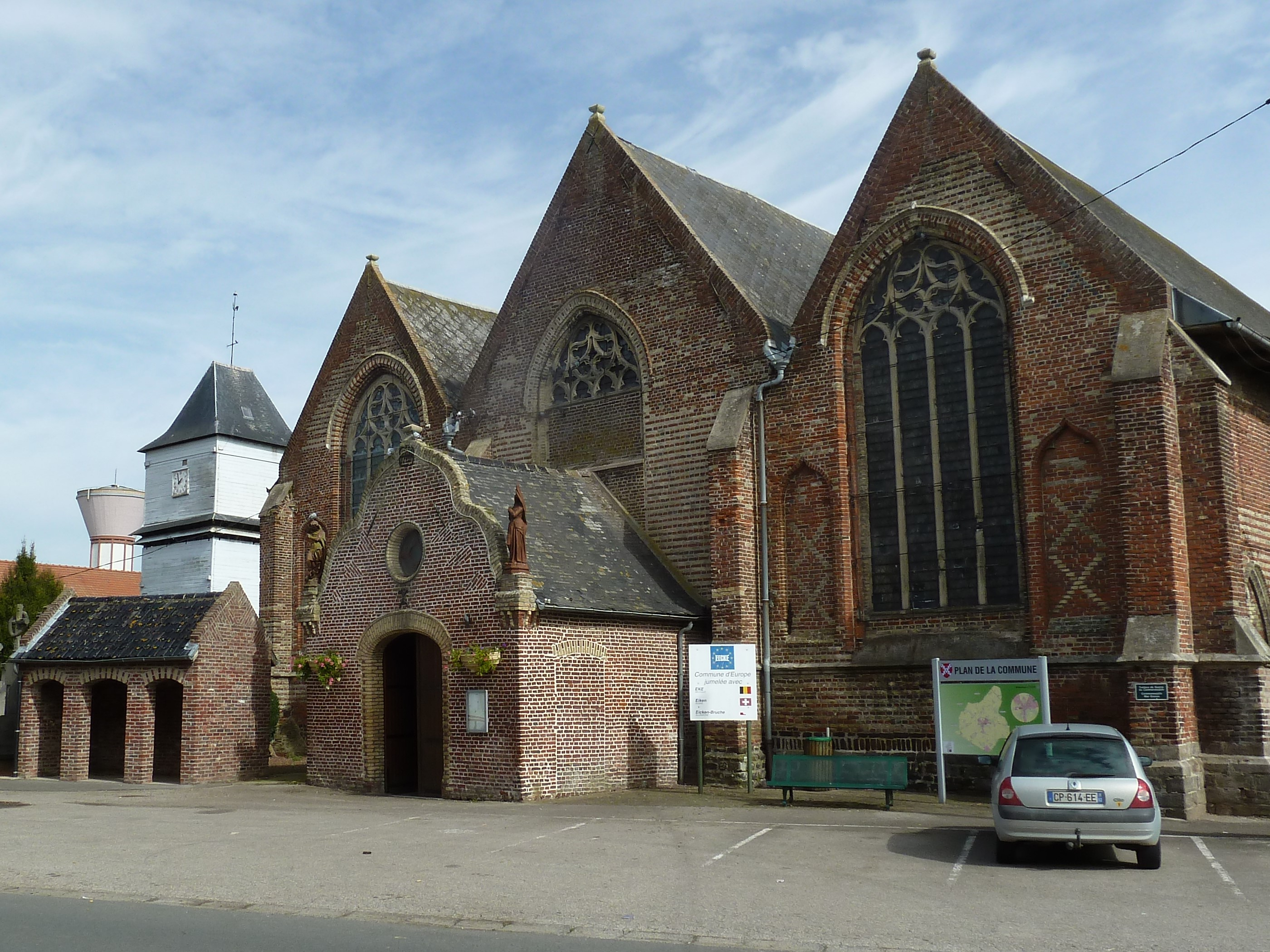 Eecke l' Eglise Saint-Wulmar et son Klockhuis